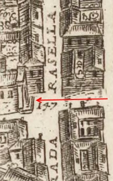 Pianta di Falda